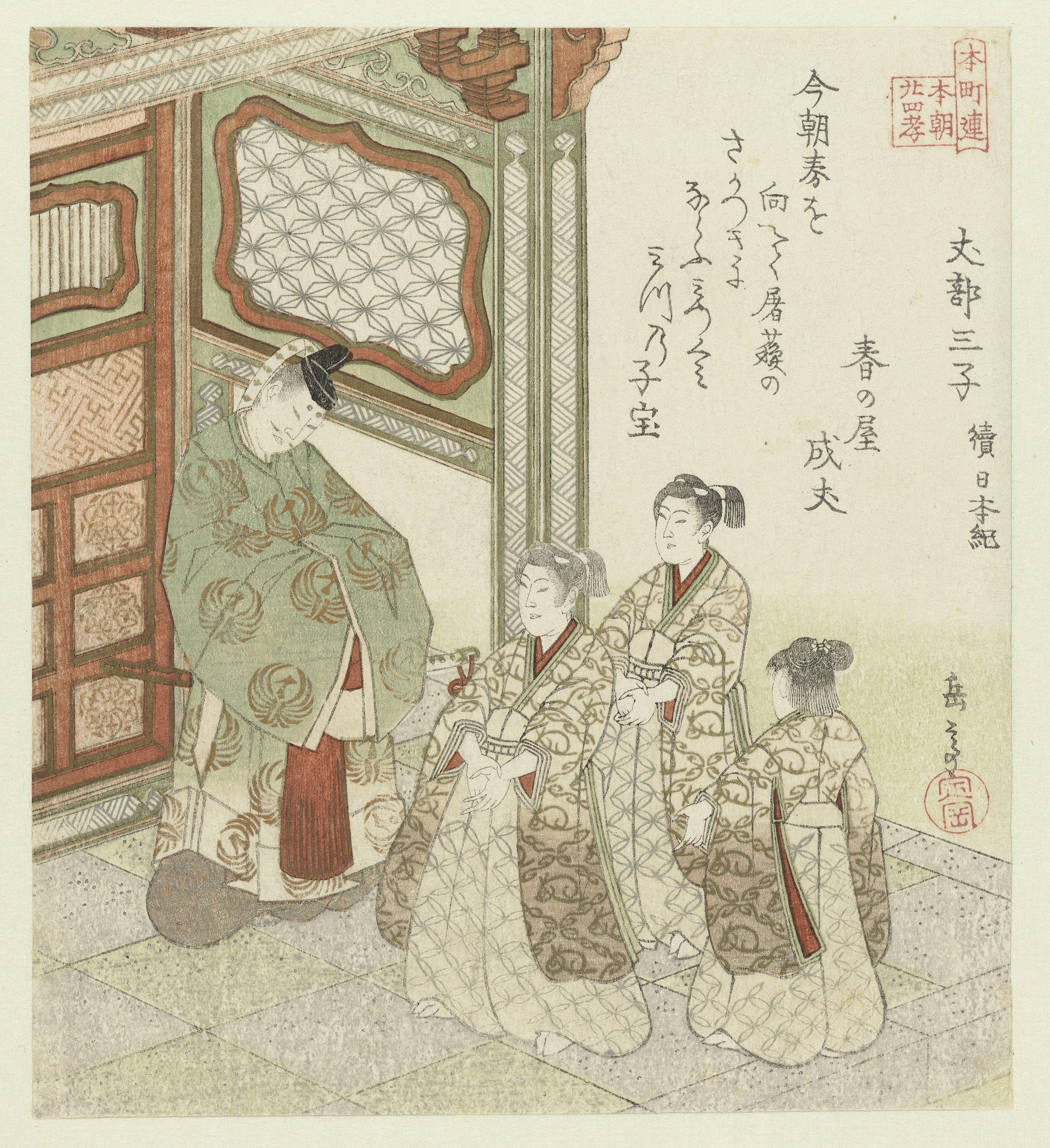 De vader Hasetsukabe leerde zijn zonen dat ze alles kunnen bereiken als ze maar samenwerken. Het Vervolg van de kronieken van Japan (Shoku Nihongi) is onder andere samengesteld door Fujiwara no Tsugutada (727-796) en Sugano no Mamichi (741-814) in 797. Met één gedicht van Harunoya Naritake: Deze ochtend de lente begint en ruikt naar gekruide rijstwijn - drie kopjes zijn op elkaar gestapeld voor drie geliefde kinderen. Label Line: mentioned on object Yashima Gakutei (1786 - 1868), 1820 - 1825, kleurenhoutsnede; lijnblok in zwart met kleurblokken; metaalpigmenten Collection: prenten; Japan (collectie)